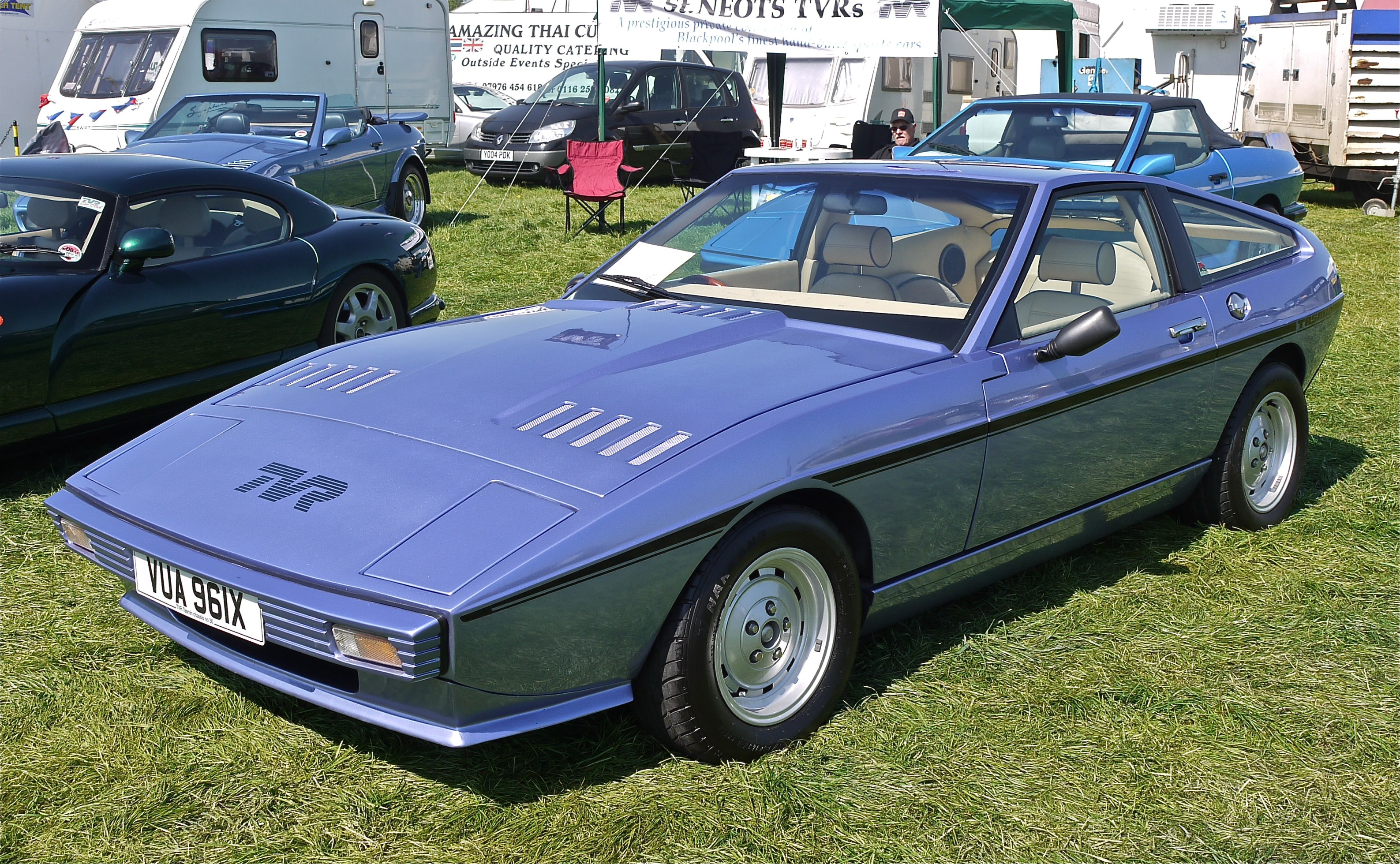 Panasonic G1 14-45 Lens